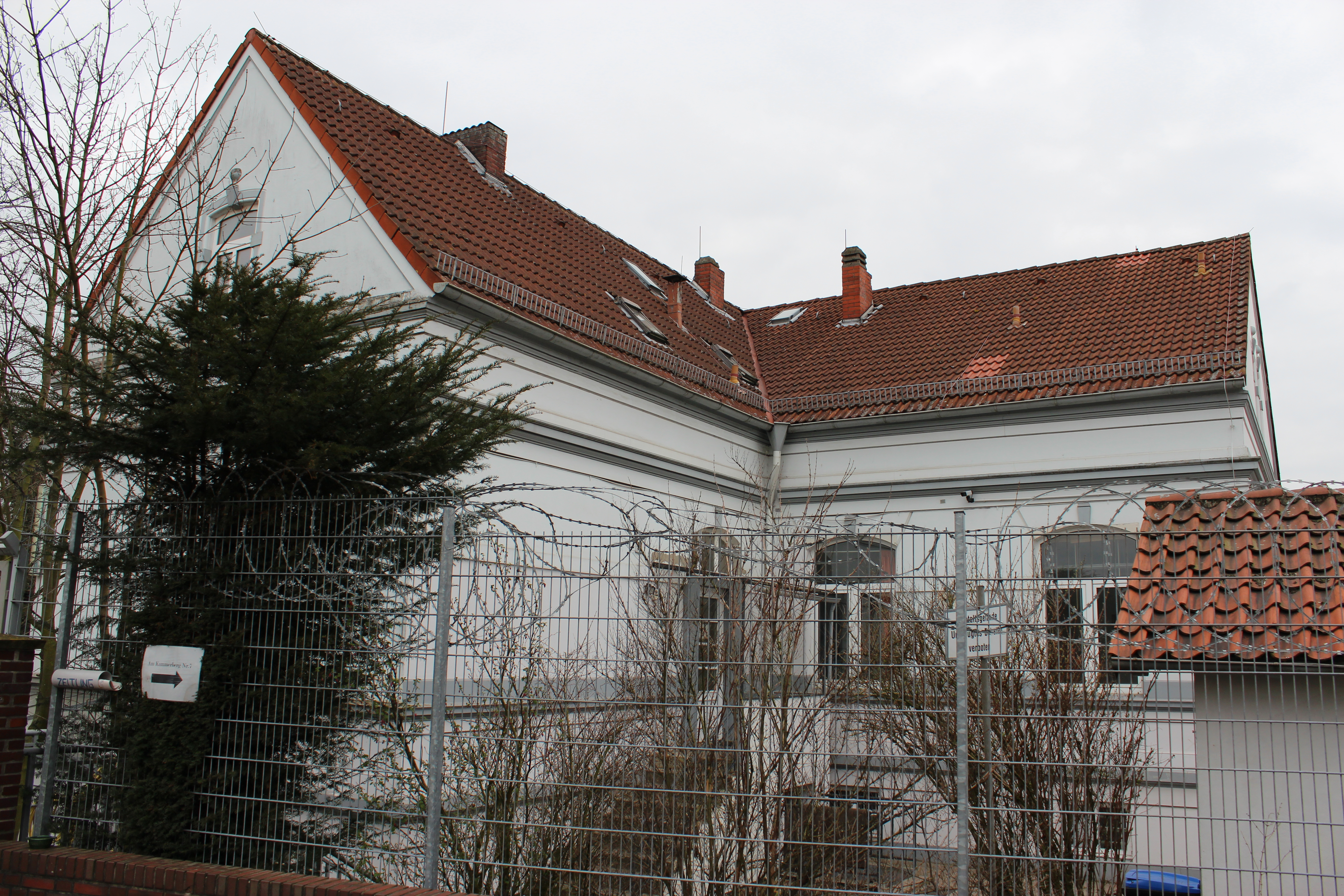 Strafanstalt Oslebshausen, Predigerwohnhaus, Justizvollzugsanstalt Oslebshausen in Bremen, Sonnemannstraße 6. Das abgebildete Objekt ist ein geschütztes Kulturdenkmal in der Freien Hansestadt Bremen, mit der Nr. 1349 beim Landesamt für Denkmalpflege registriert.